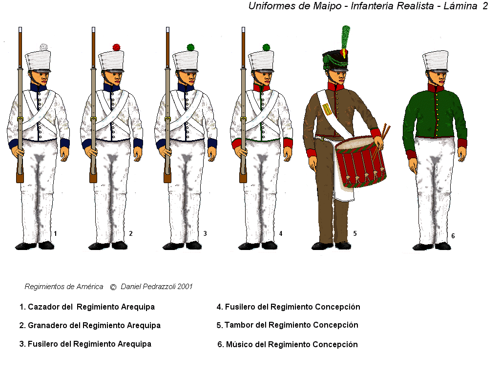 Uniformes Realistas - Campaña de Chile 1817